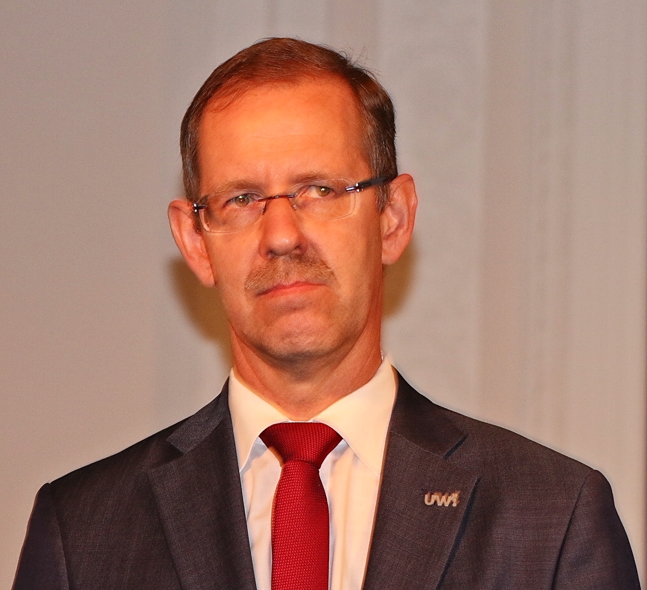 Rektor UW Marcin Pałys na Wieczorynce w Pałacu Kazimierzowskim na zakończenie obchodów 200 lecia UW